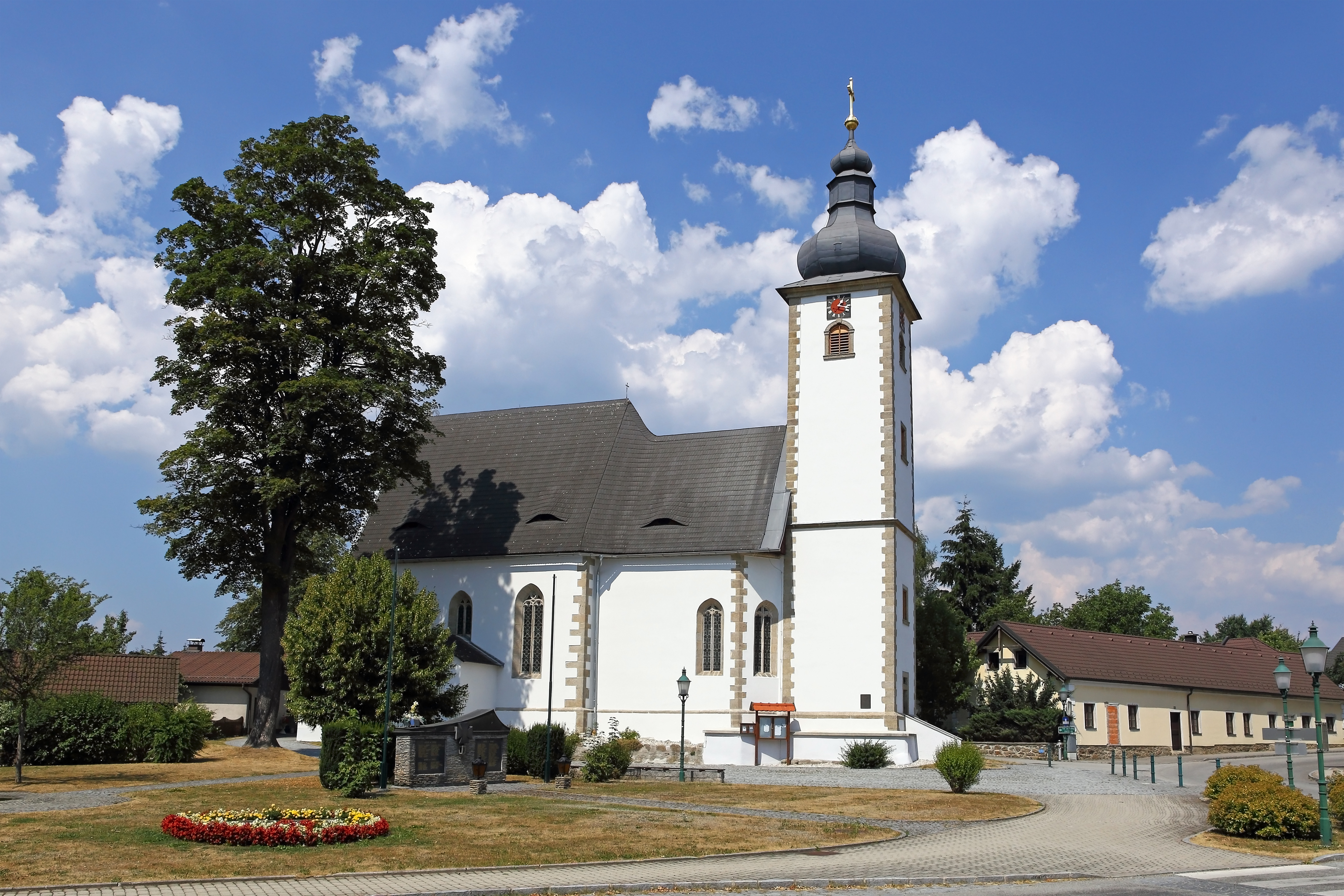 Die am nördlichen Ende des Angers von Dietmanns gelegene Pfarrkirche hll. 14 Nothelfer ist eine spätgotische Hallenkirche aus der zweiten Hälfte des 15. Jahrhunderts.